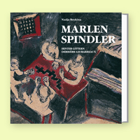 Marlen Spindler Band 2